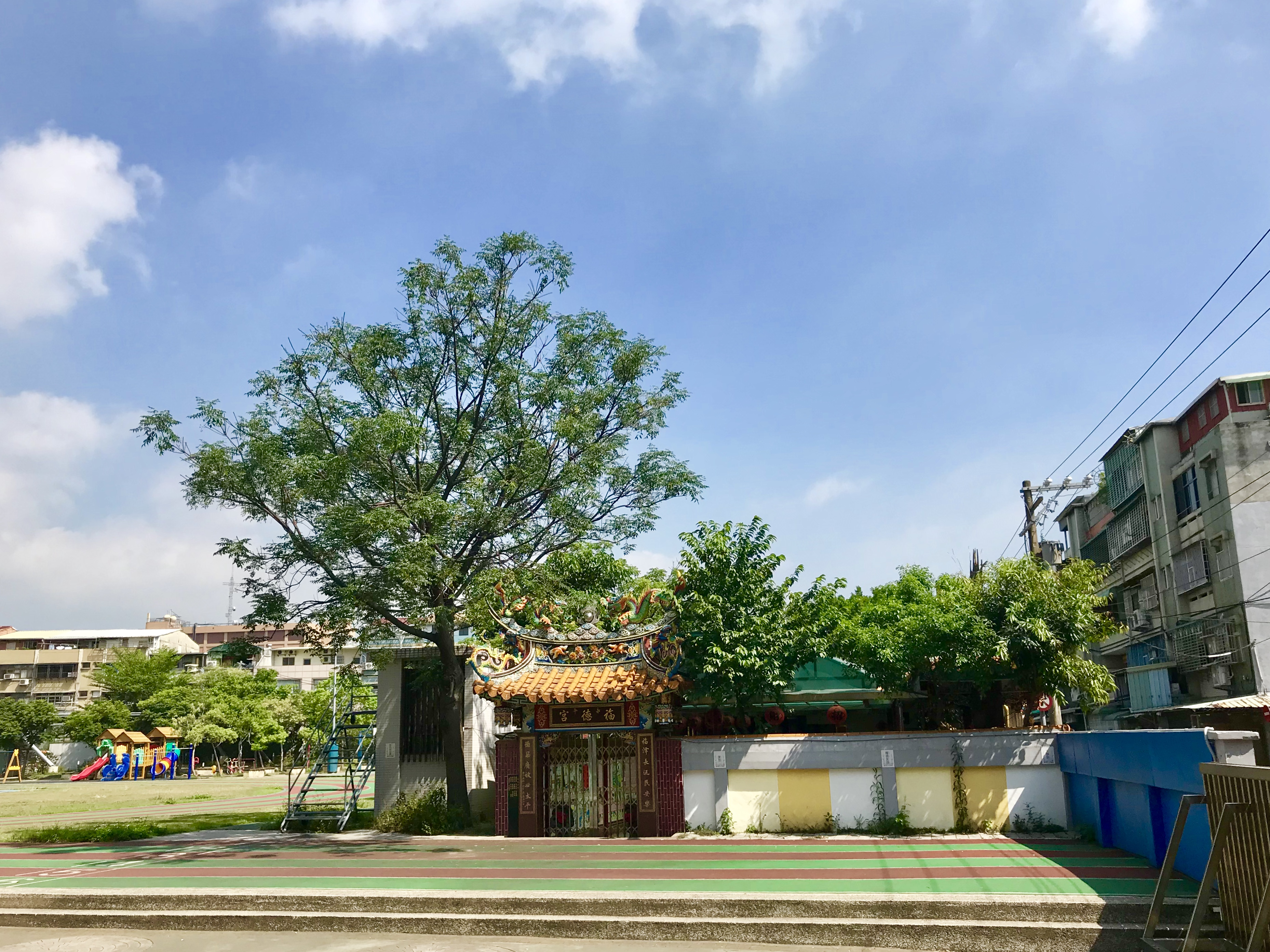 中文（台灣）: 社子國小校內的永平福德宮。